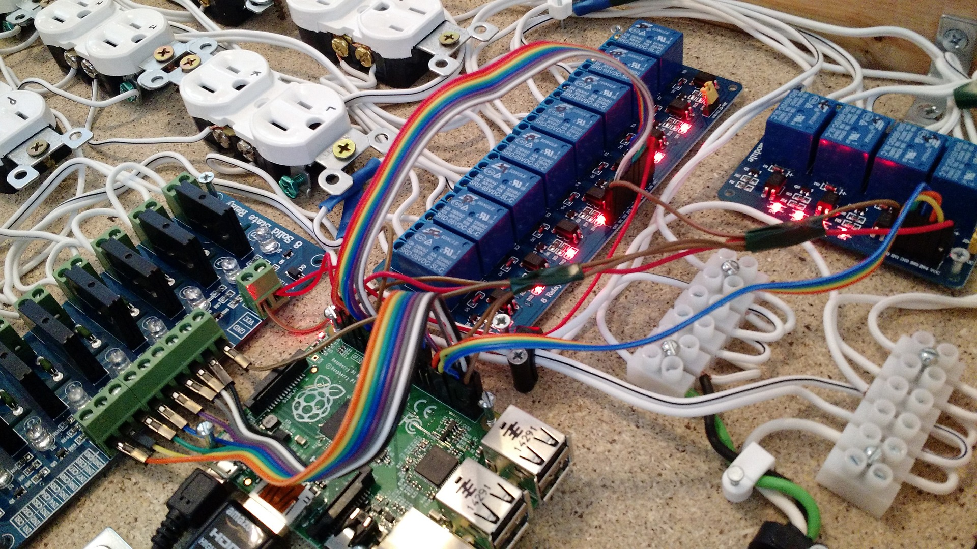 Interface de potência